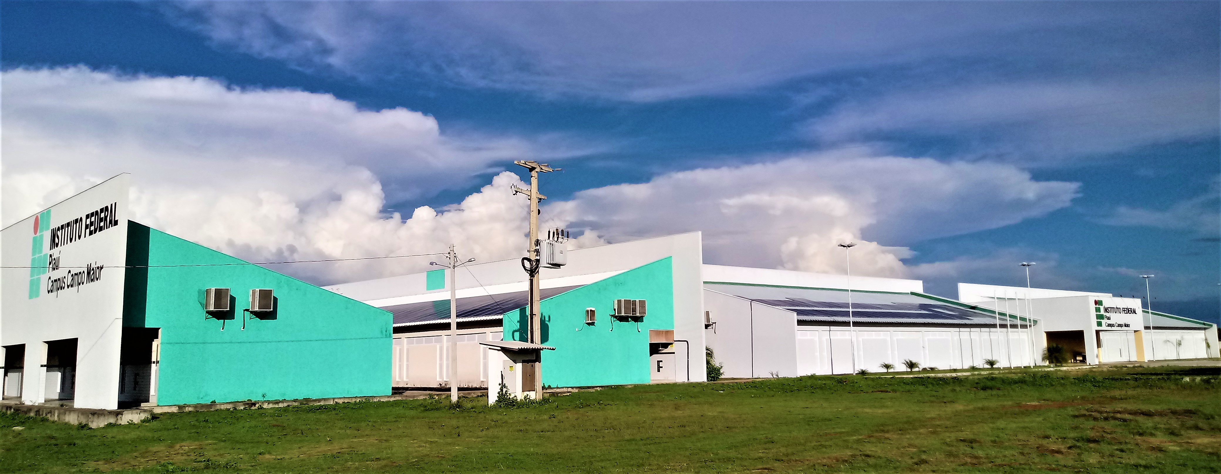 Campus do Instituto Federal de Educação, Ciência e Tecnologia do Piauí em Campo Maior.